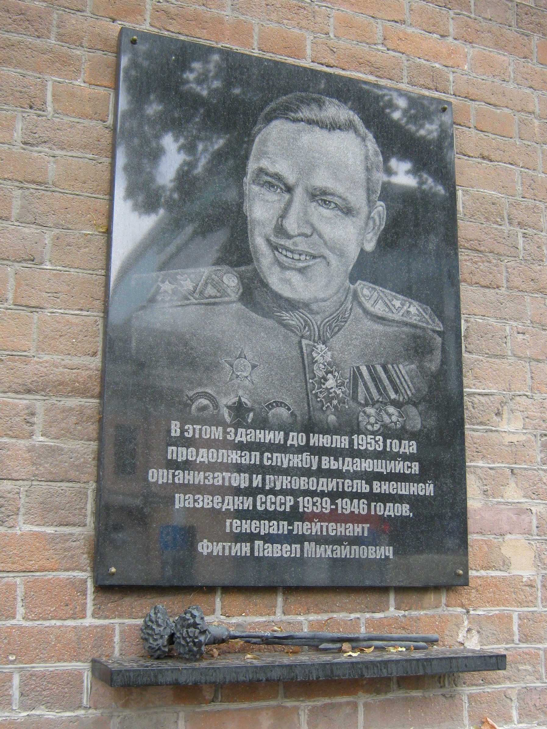 Мемориальная доска Фитину (Екатеринбург)